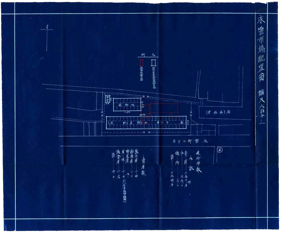 1934年台南永樂市場新築配置圖，《臺灣總督府檔案》，國史館臺灣文獻館